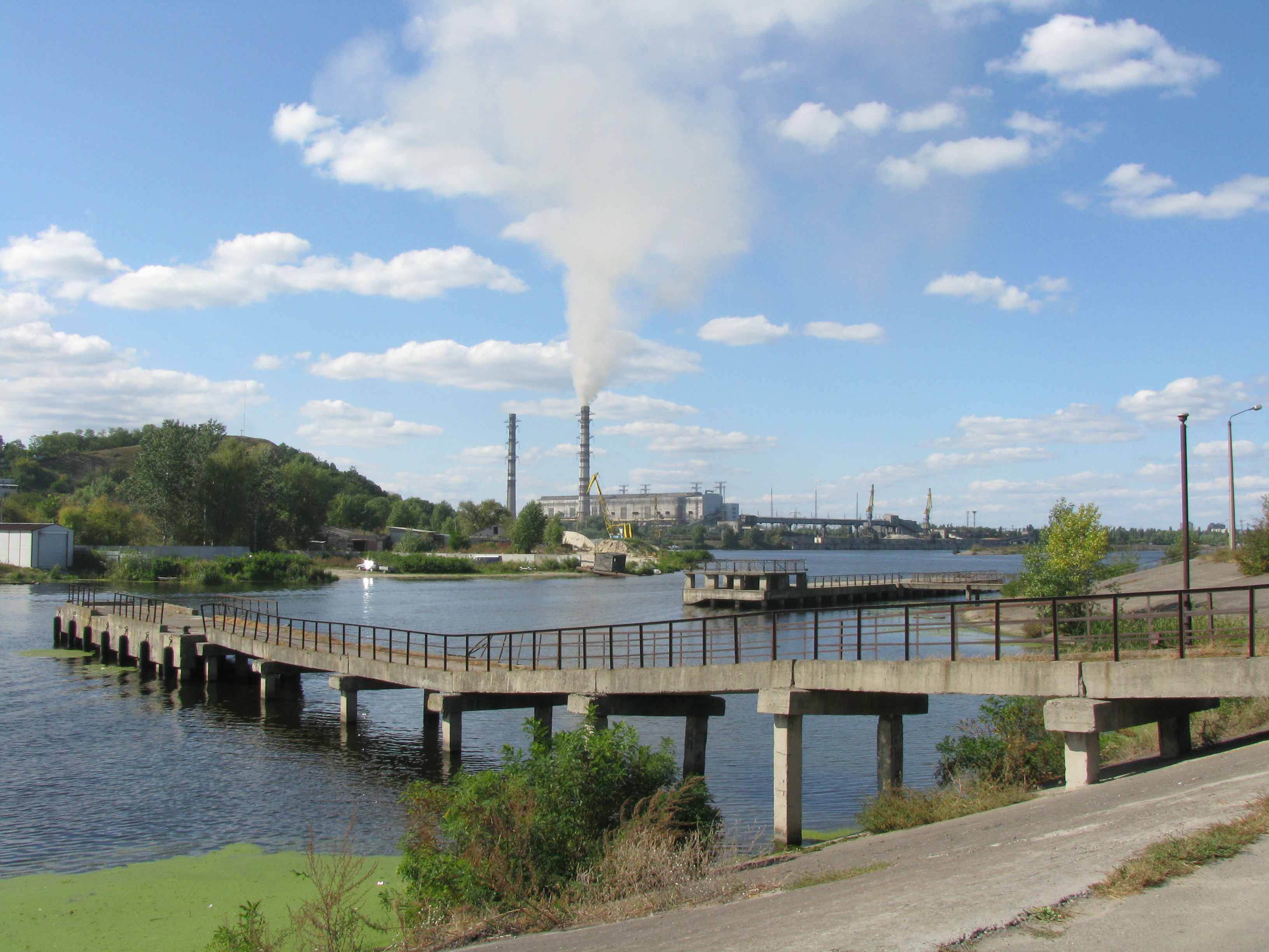 Гирло річки Красної, Трипілля